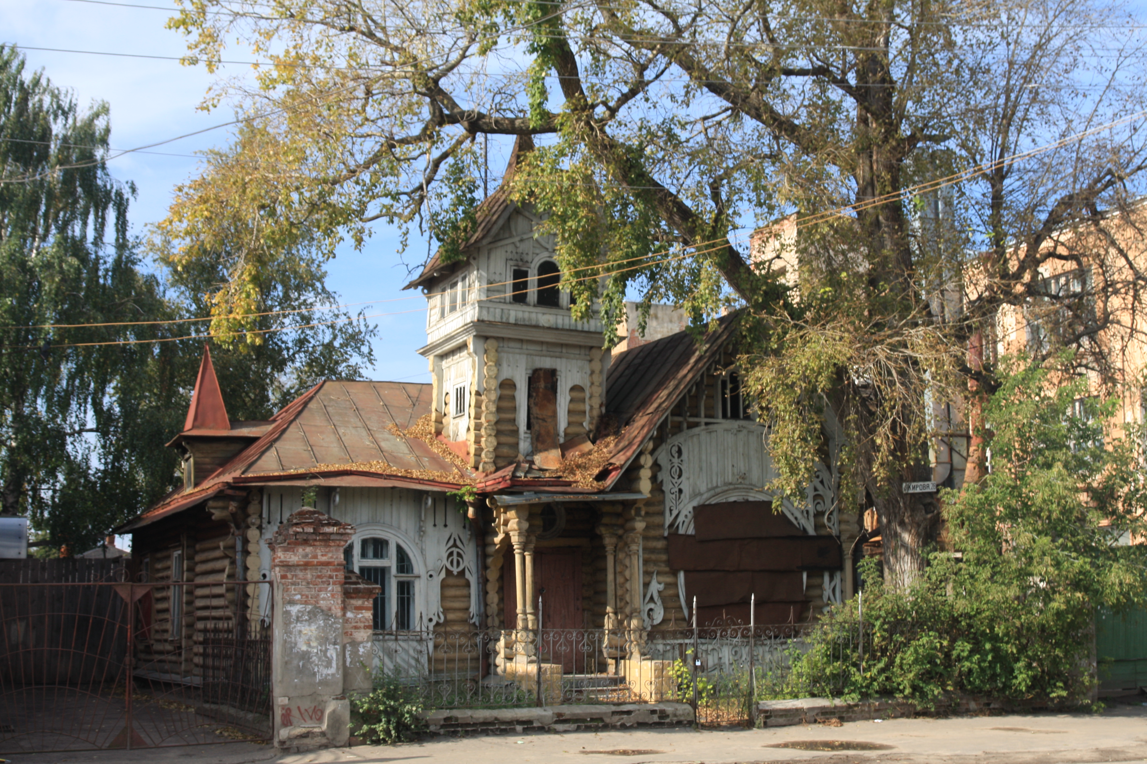 Дом Лужина